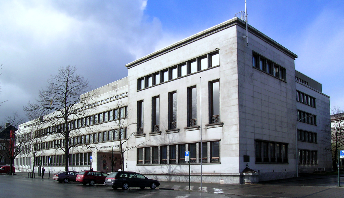 Trondheim Tinghus, Munkegata 20. Bygd 1951. Arkitekt: Hjalmar S. Bakstad.